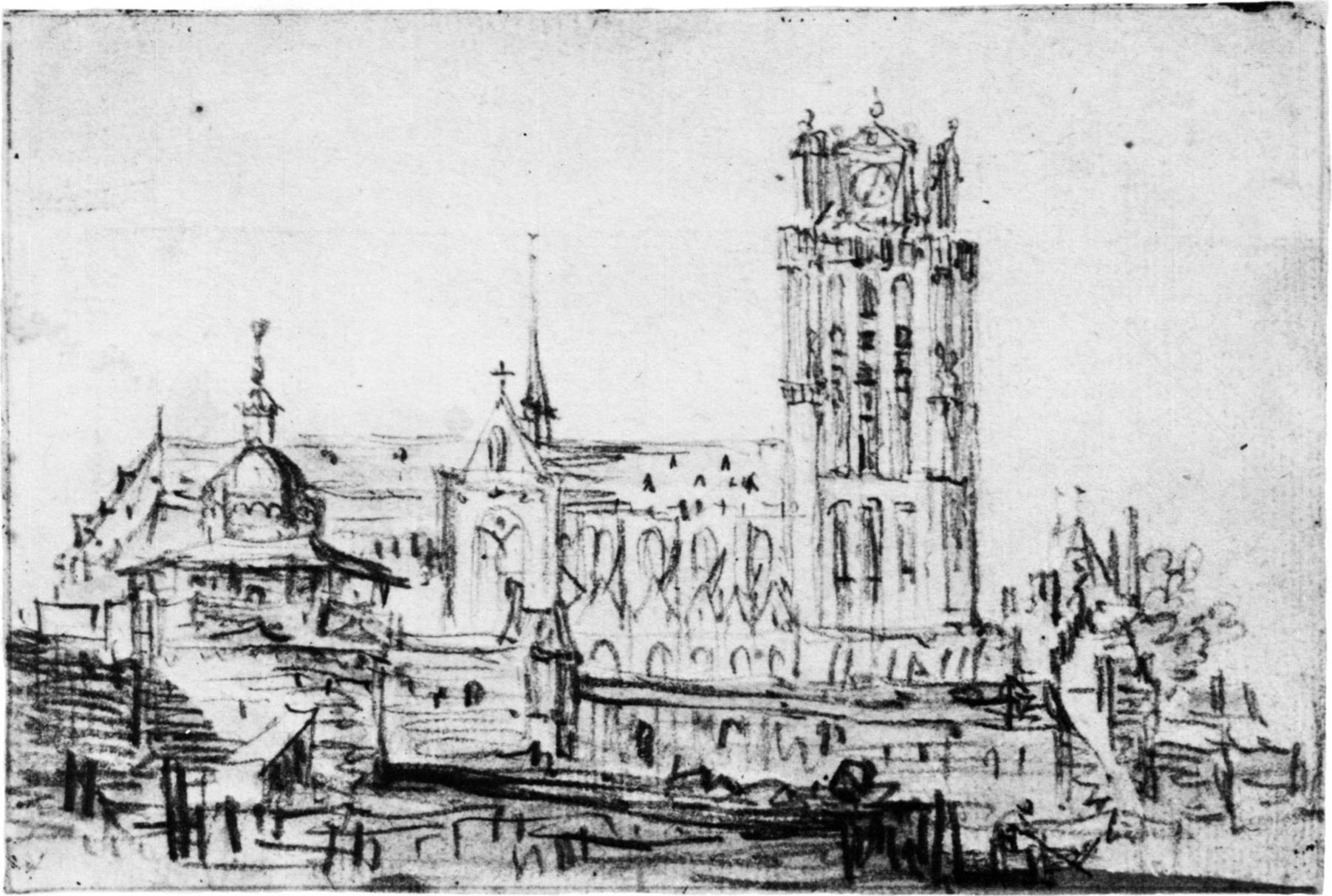 View of the Grote Kerk in Dordrecht. In front of the church runs the city wall. To the left, with the domed roof, is the Engelenburg bastion. ezicht op de Grote Kerk in Dordrecht. Voor de Grote Kerk loopt de stadsmuur. Links met het koepeldak is het rondeel Engelenburg.